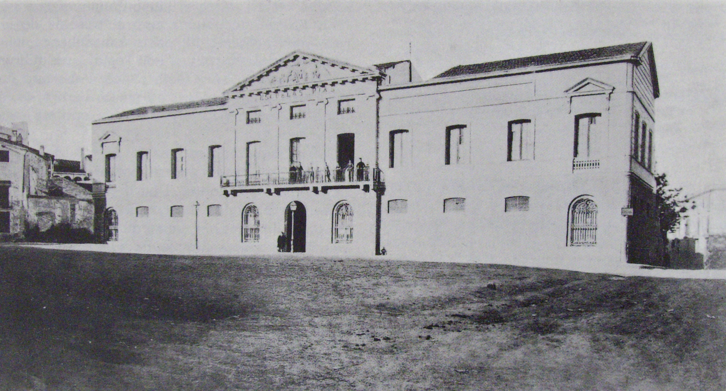 Antiguo colegio Escolapio construido en 1871 por Gabriel Batllevell i Tort, desde 1885 es la sede del Ayuntamiento de Sabadell.